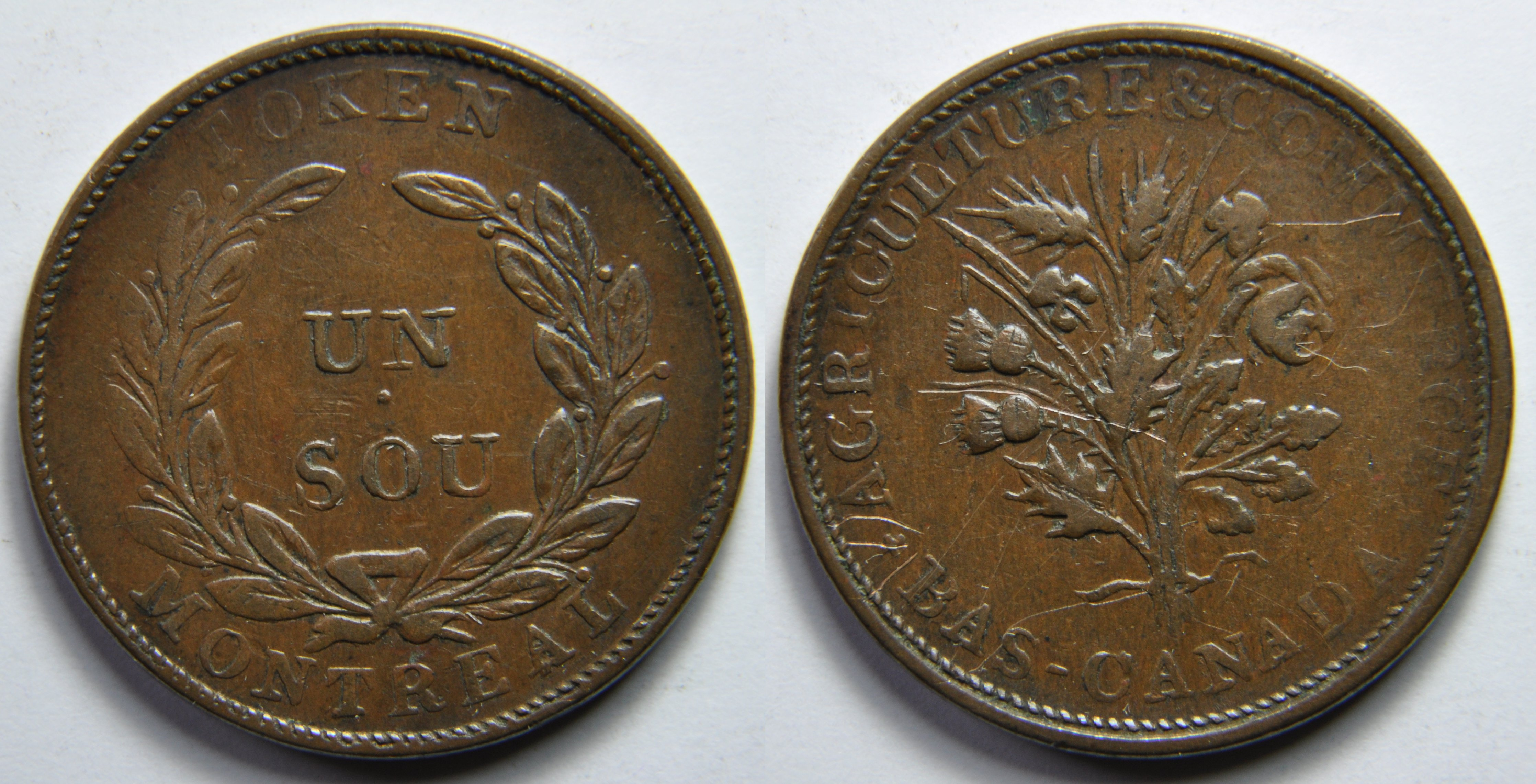 Un token ou un sou du Canada, Montreal avant 1837. A/ UN . SOU ; couronne de laurier ; TOKEN ; MONTREAL R/ Bouquet de fleurs ; + AGRICULTURE & COMMERCE + BAS-CANADA Tranche lisse Poids : 7.5 g. Diamètre : 27 mm Référence : aucune